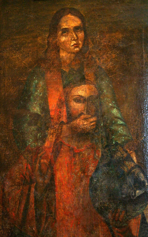 Святий Стефан затуляє рукою Христові вуста.